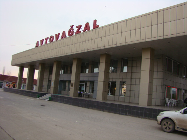 Bakı Qazax magistralı üzərindəki Ucar avtovağzalı